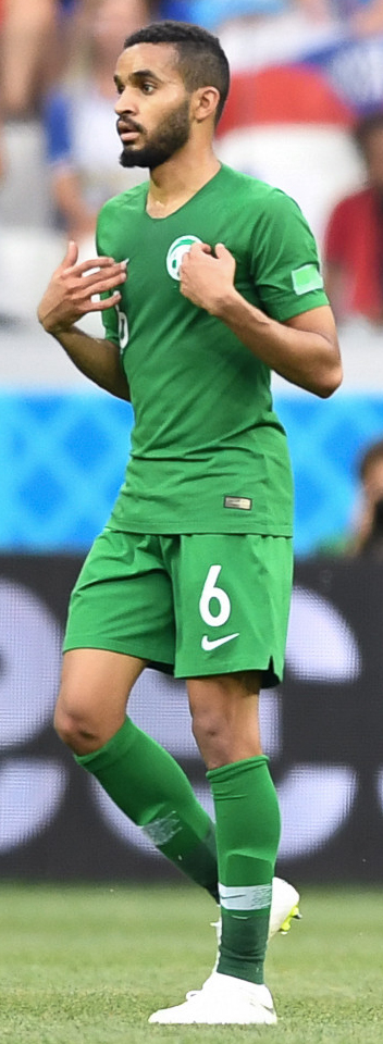 Египет с Салахом проиграл Саудовской Аравии